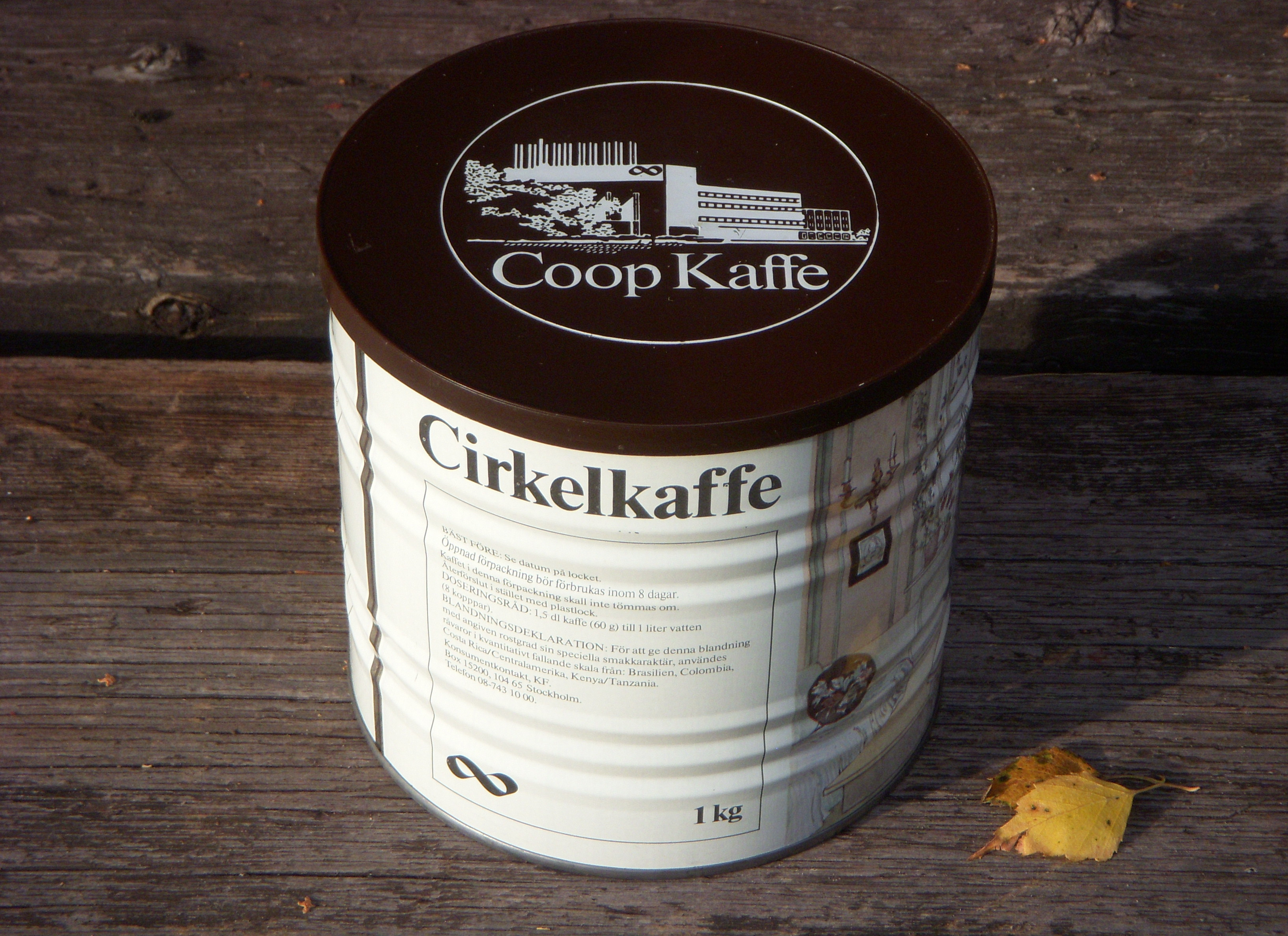 KF:s Cirkelkaffe